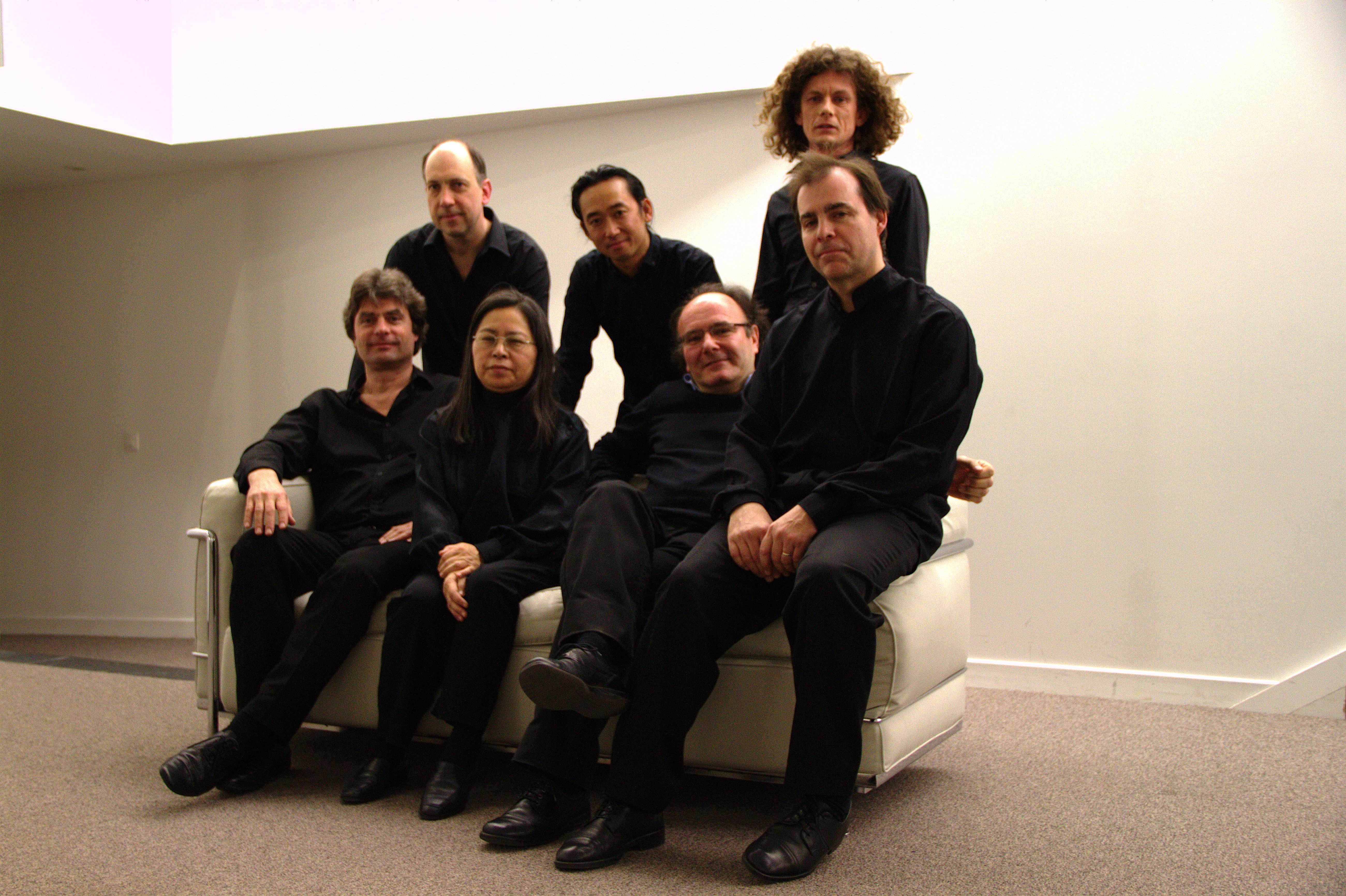 José Manuel López López au centre, entouré par les Percussions de Strasbourg à l’Auditorium de la Cité de la Musique et de la Danse de Strasbourg le 2 avril 2013 .